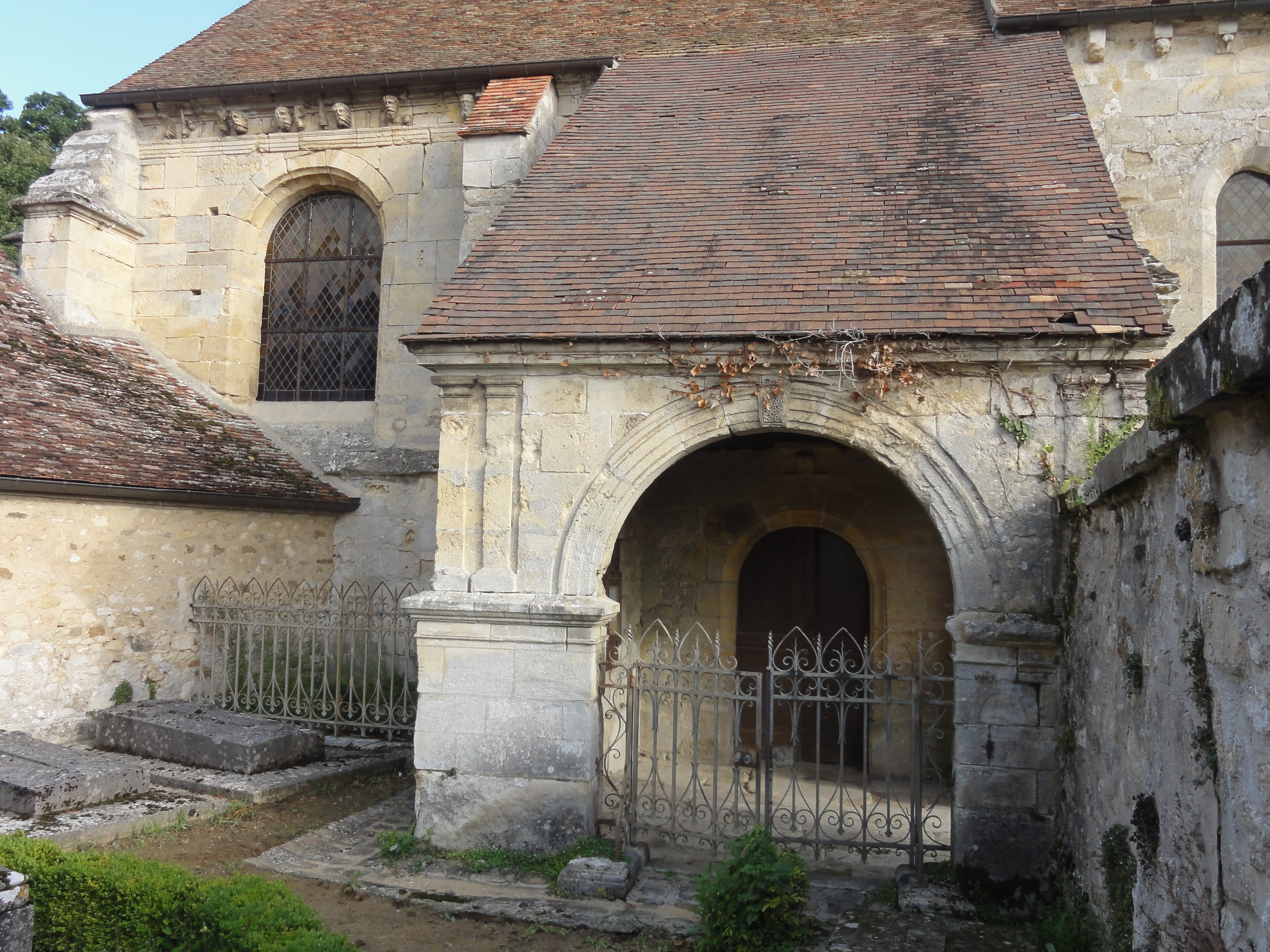 Église Notre-Dame-de-l'Assomption de Montgeroult - voir titre.